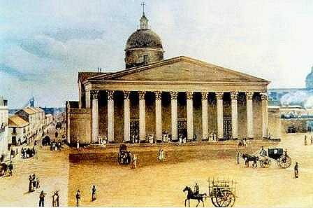 Buenos Aires Cathedral ca. 1830